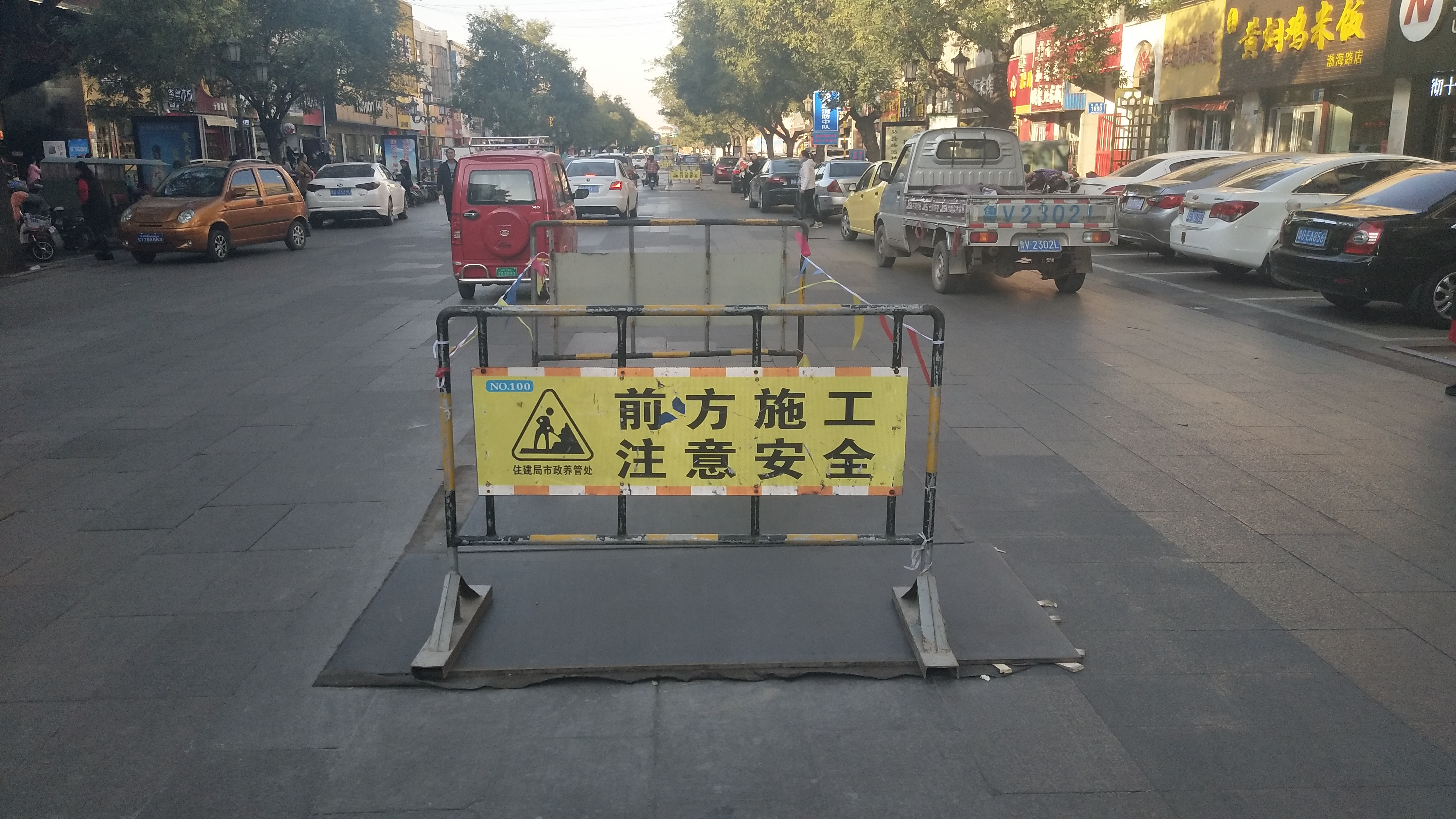 挖补维修中的渤海路商业街，新更换的大理石板上方覆盖有钢板，以防止大理石板被二次破坏